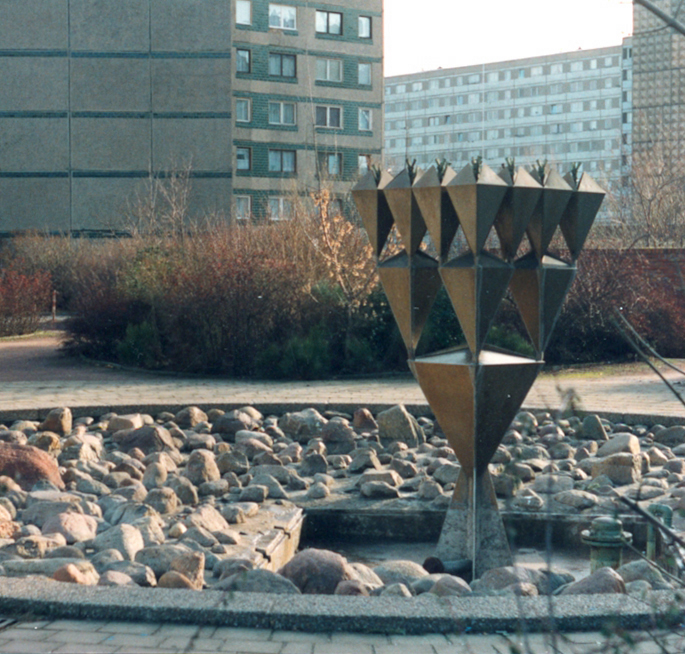 Irmtraud Ohme (1937-2002), Chemiebrunnen, 1981, Edelstahl Carl-Schorlemmer-Ring